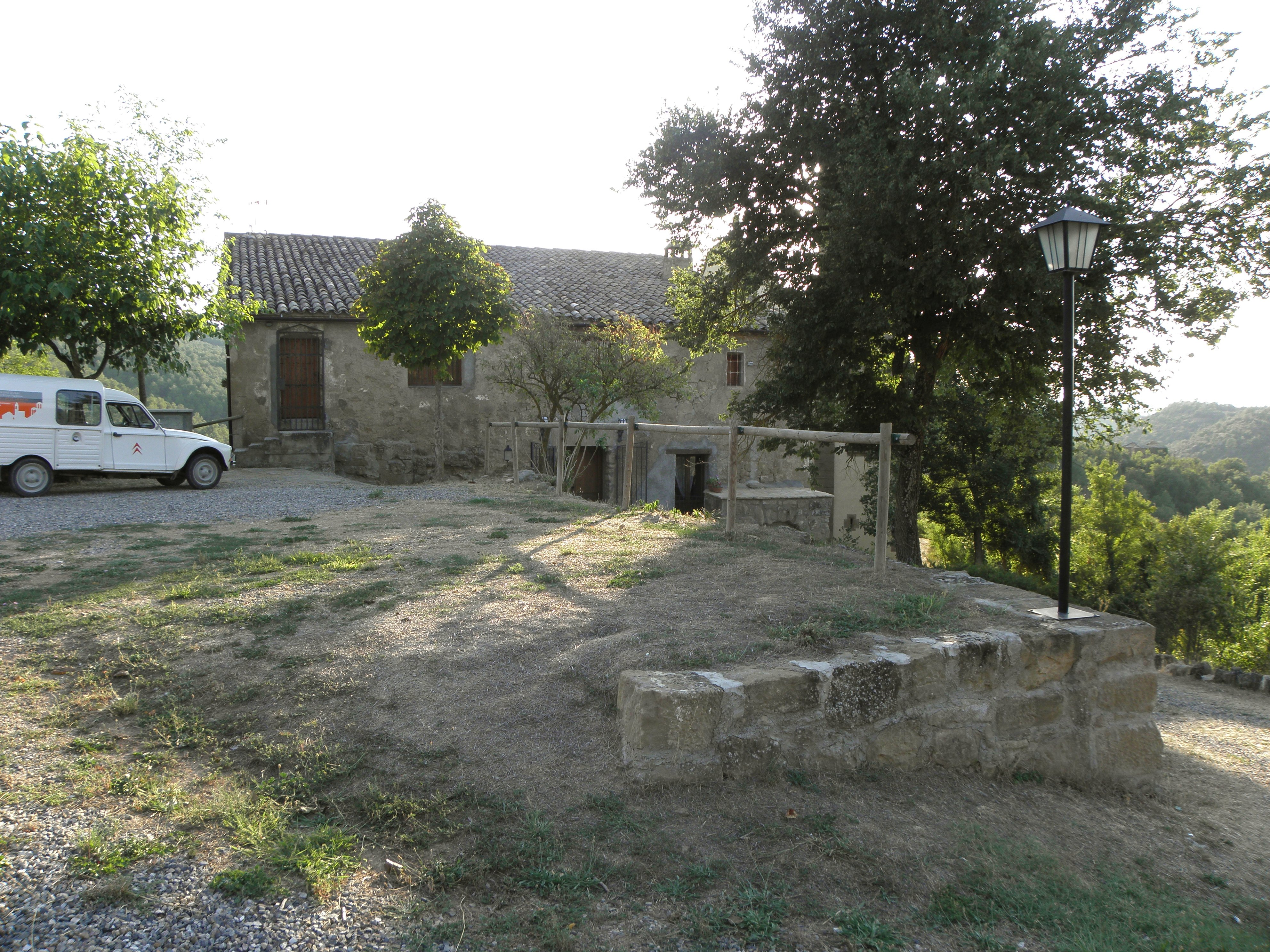 La façana nord-oriental de la rectoria de Madrona (Pinell de Solsonès).